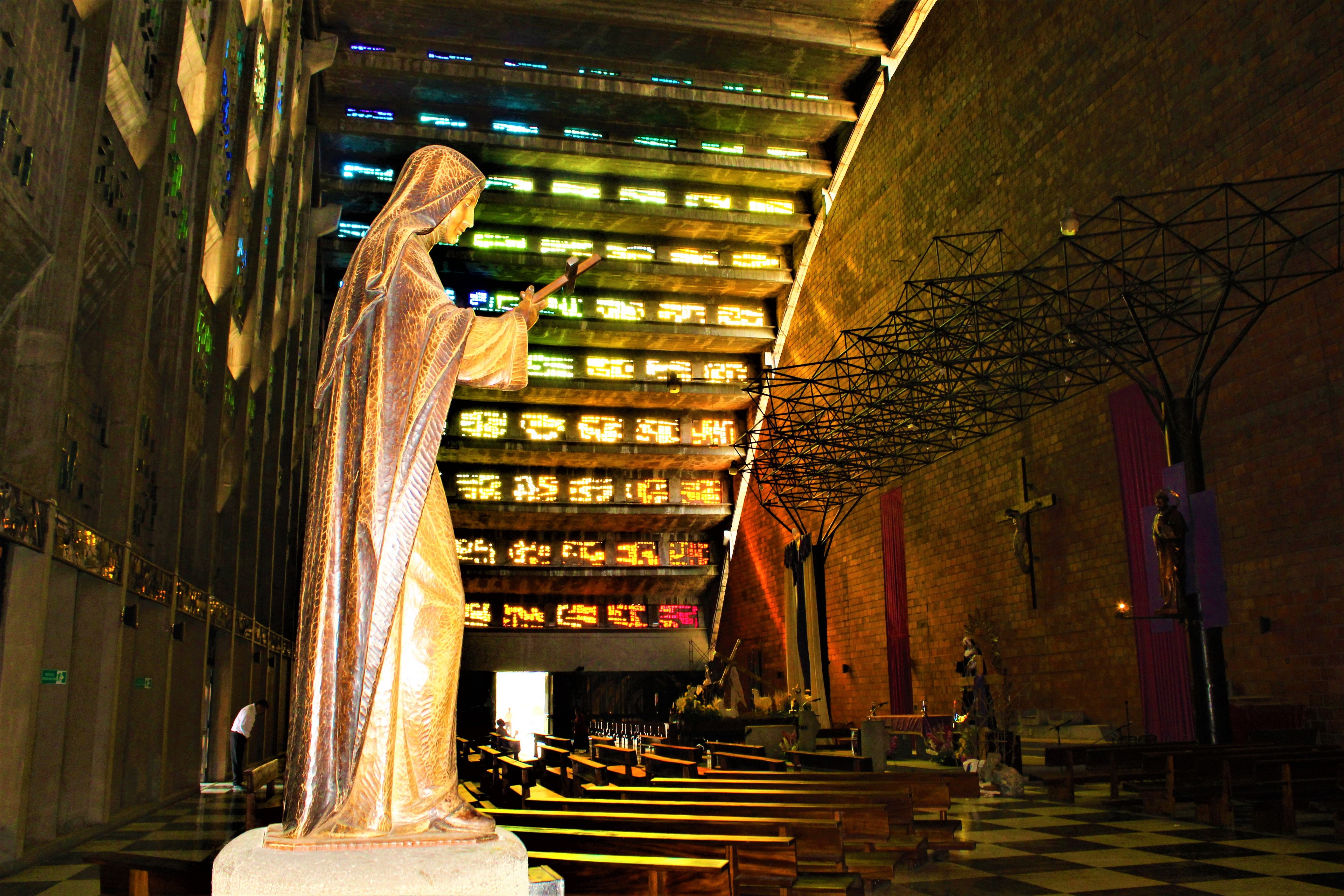 Interior de la Iglesia El Rosario